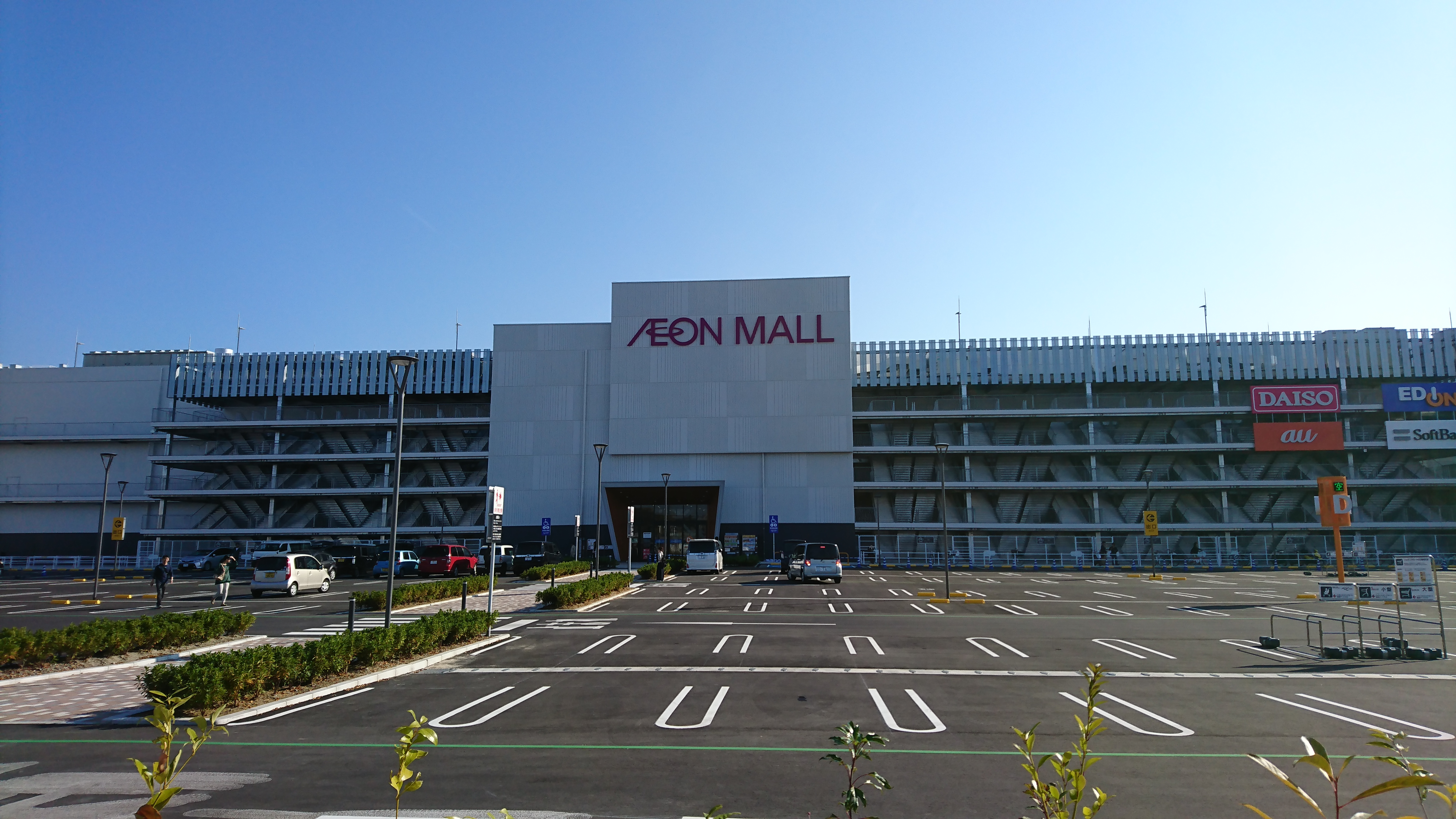 西側から撮影。